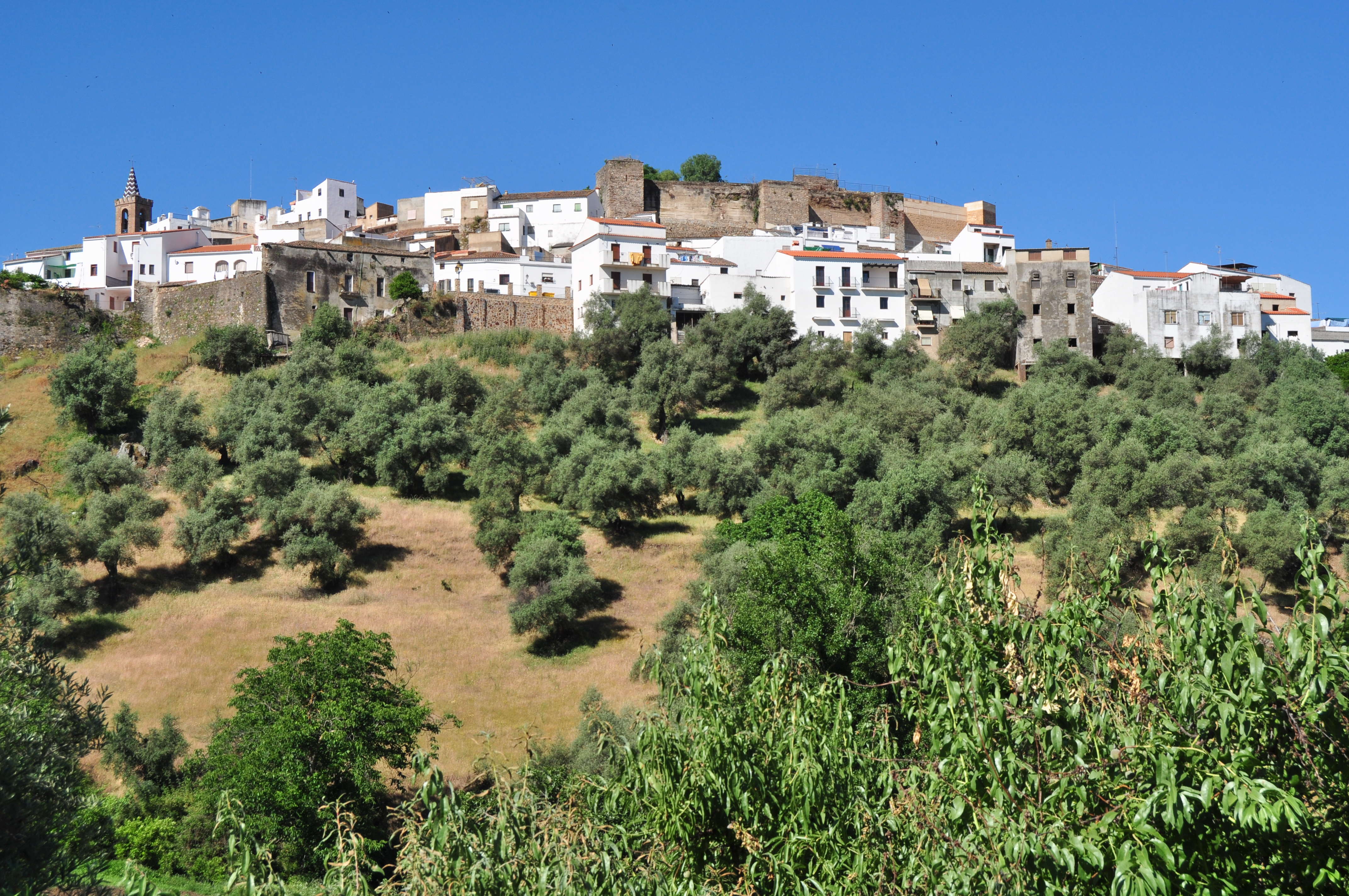 Aroche - 001